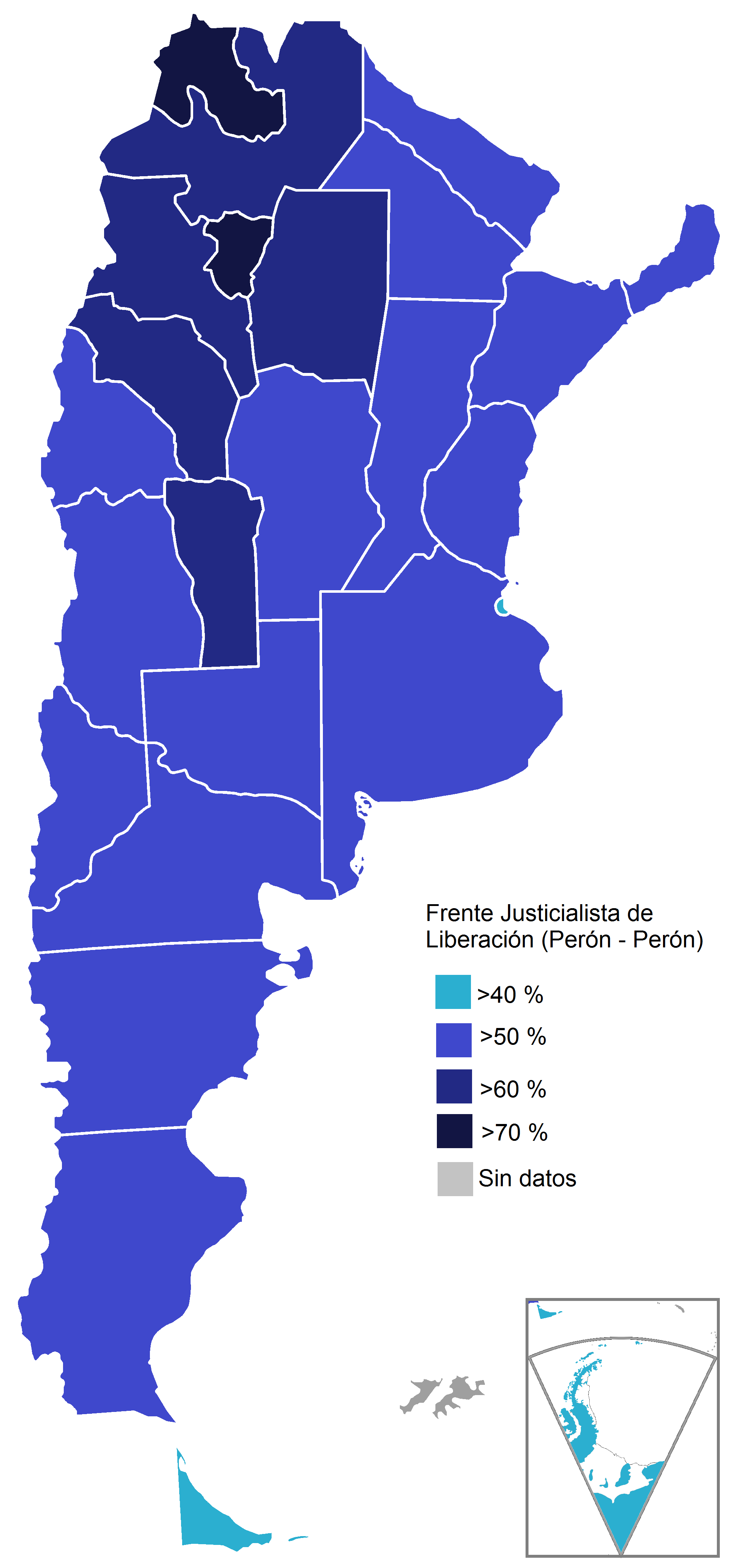 Mapa de las elecciones presidenciales de de Argentina de septiembre de 1973, donde triunfó Juan Domingo Perón.